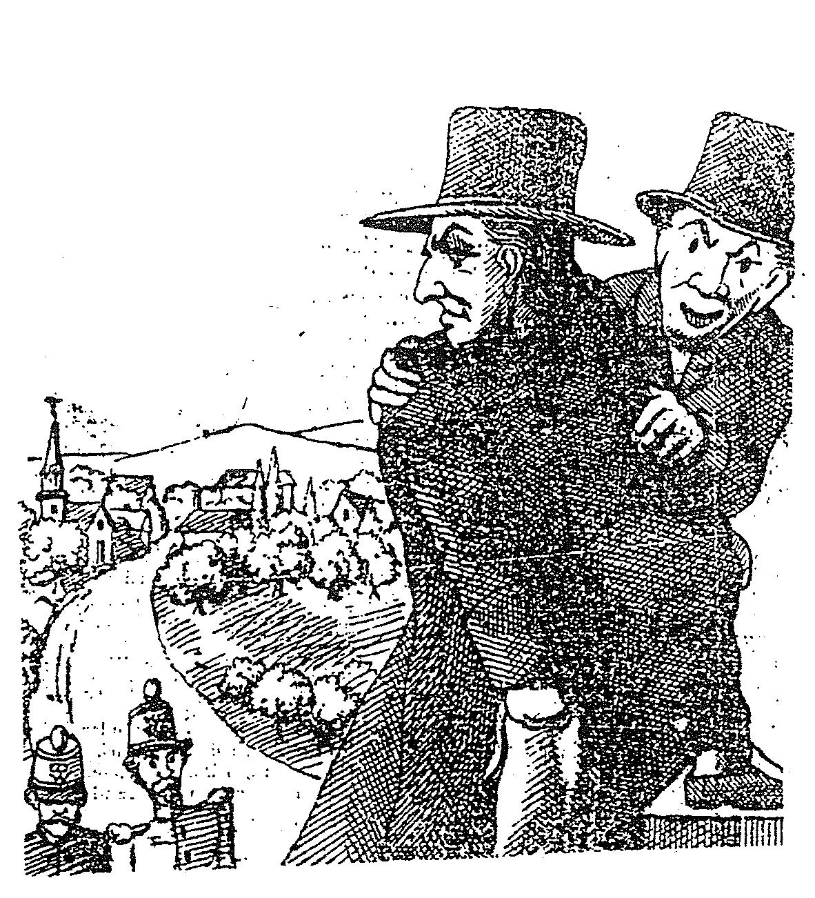 De Paschtouer vu Maarnech; Karikatur an der Wäschfra vum 21. Mee 1870.